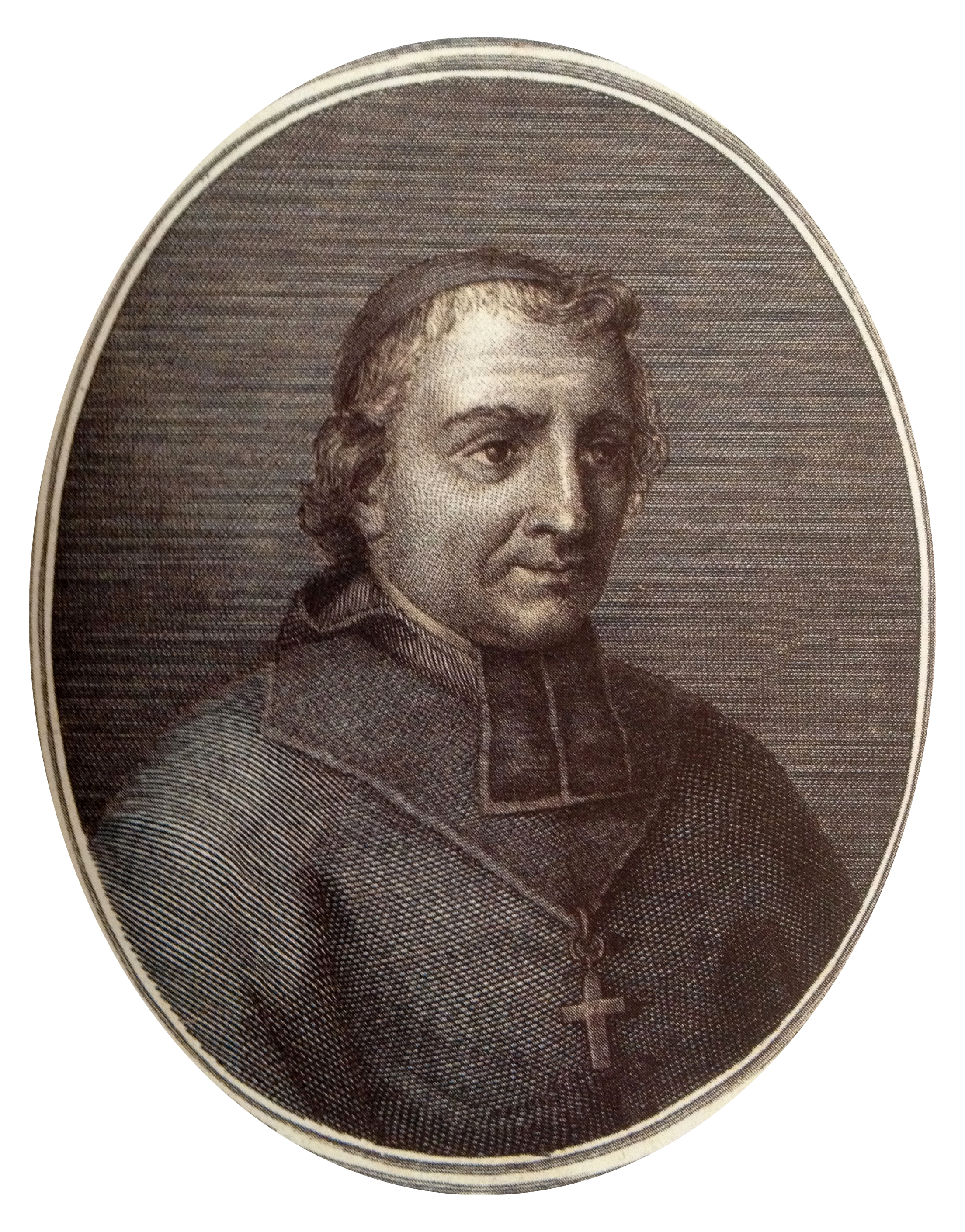 Gravure d'Étienne-Hubert Cambacérès.